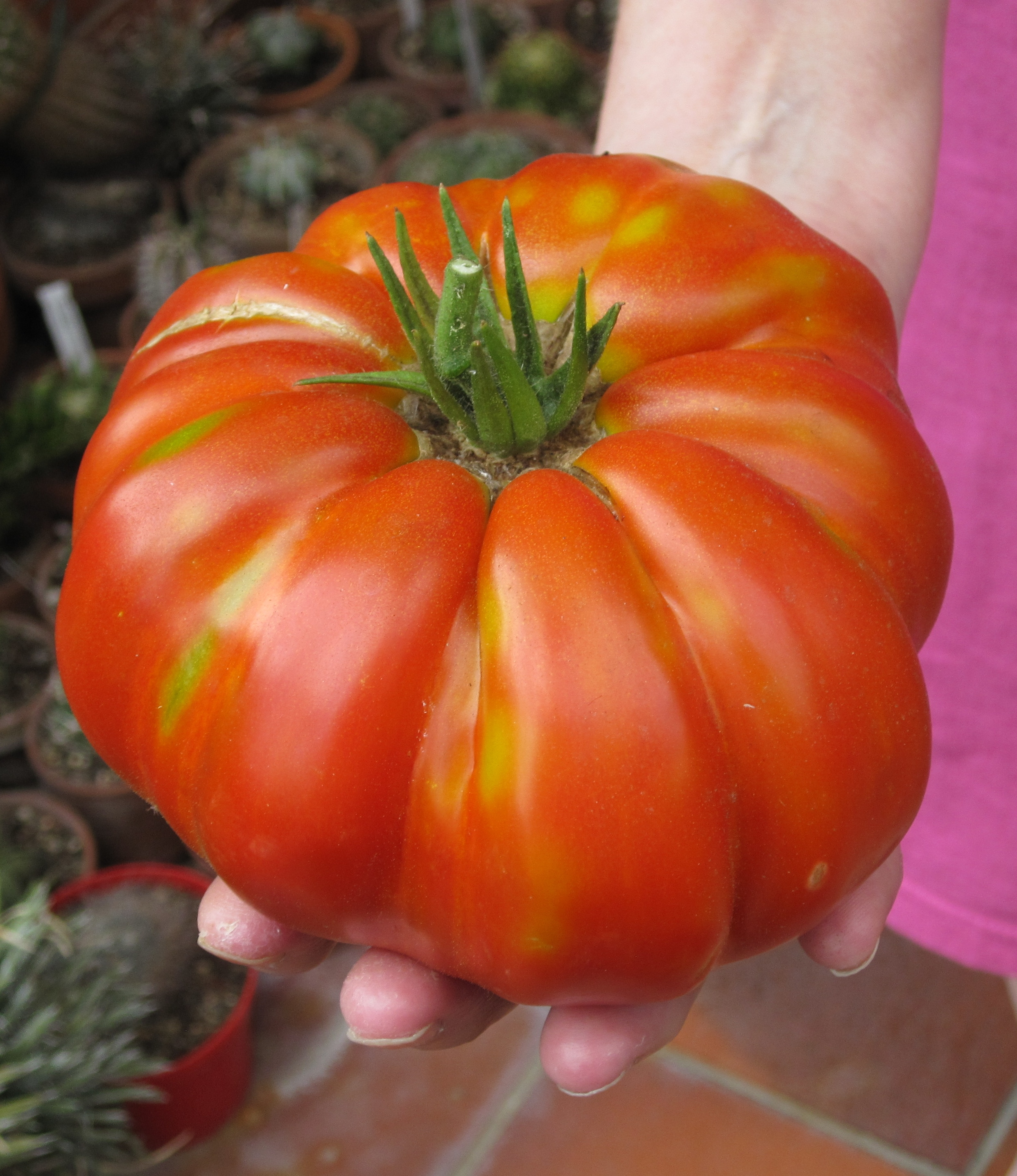 Solanum lycopersicum - Il frutto appena colto